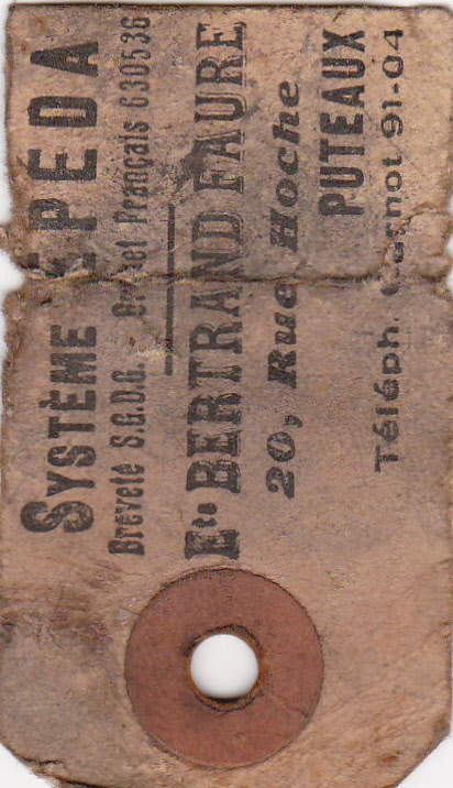 this label is hung from my car Peugeot 201 and was under the seat in the spring metal springs